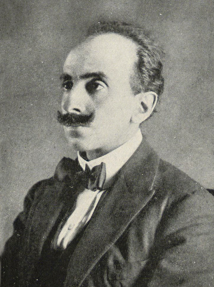 Francisco Contreras Valenzuela (Quirihue 21 de enero de 1877 - París, 3 de mayo de 1933). Poeta, ensayista, novelista y crítico literario chileno.